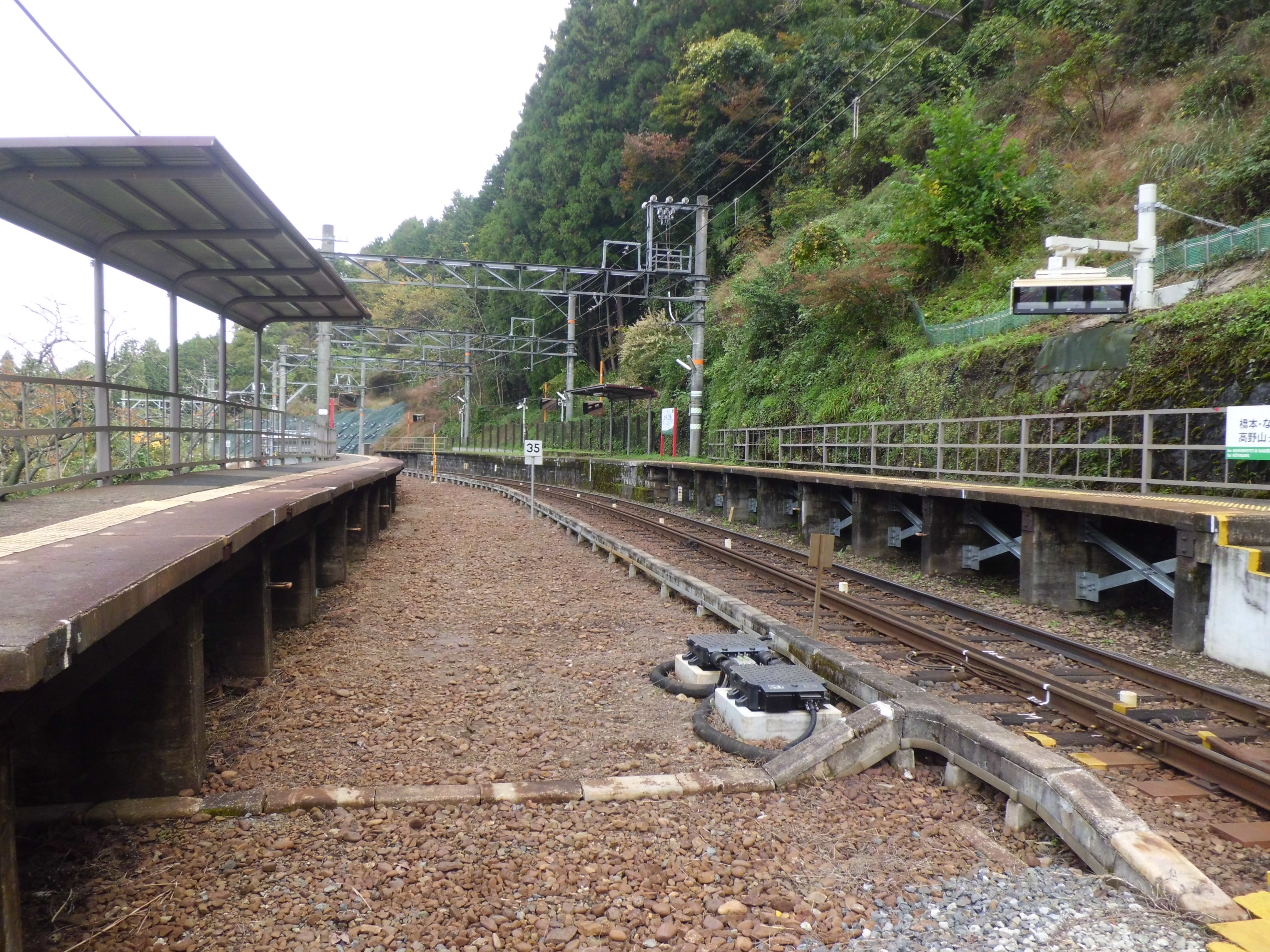 上古沢駅上下線ホーム